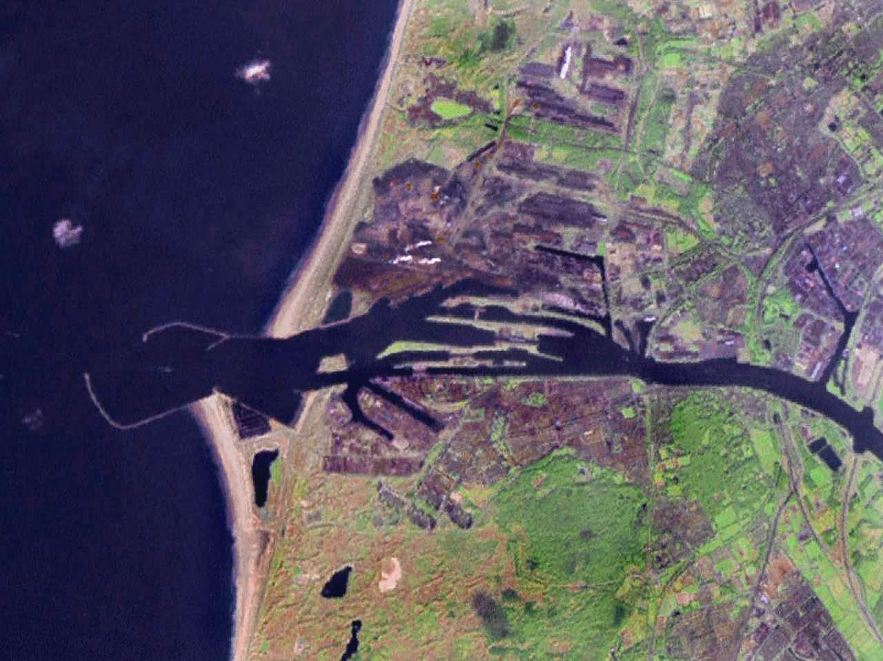 IJmuiden aan het Noordzeekanaal. Zeehaven, de Hoogovens. Contrast en kleur bijgestel van van: Afbeelding:IJmuiden 4.59609E 52.47021N.jpg Ed Stevenhagen 22 jul 2005 09:23 (CEST) De bovenstaande afbeelding is afkomstig van Wikimedia Commons, een verzameling van vrije inhoud die door de Wikimedia Foundation wordt gehost. Klik hier voor de afbeelding op commons zelf. Op Commons is de beschrijving van deze afbeelding aldus: Screenshot from NASA World Wind. This image is in the public domain because it contains materials that originally came from NASA and works created by the U.S. federal government cannot be copyrighted. Exception is the usage-restricted NASA logo. See the NASA copyright policy for more information.